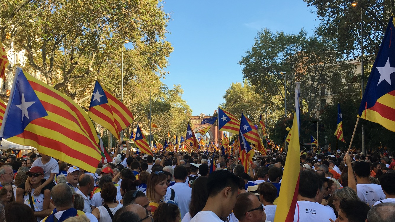 Manifestació "A punt, Endavant República Catalana" de la Diada Nacional de Catalunya 2016 al Passeig de Sant Joan de Barcelona.